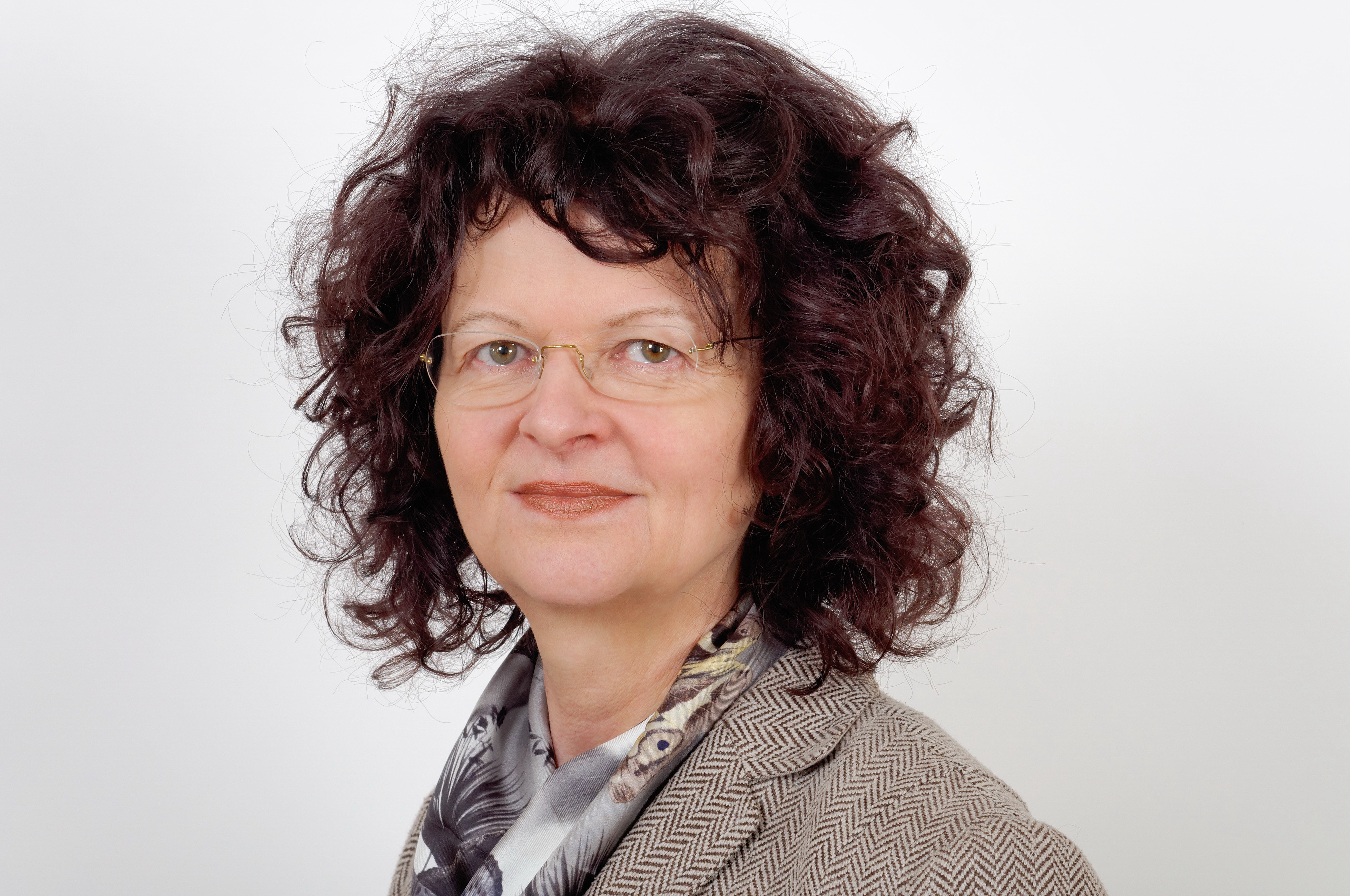 Landtagsprojekt Hessen